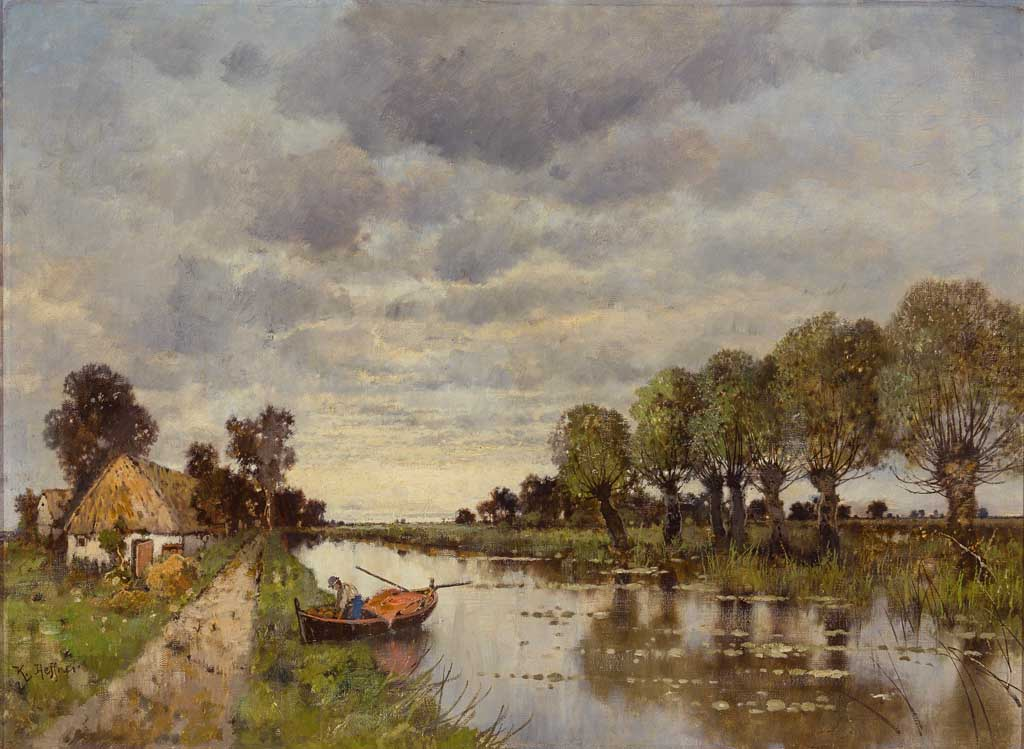 Märkische Landschaft'. Öl/Lwd. 70 x 85 cm